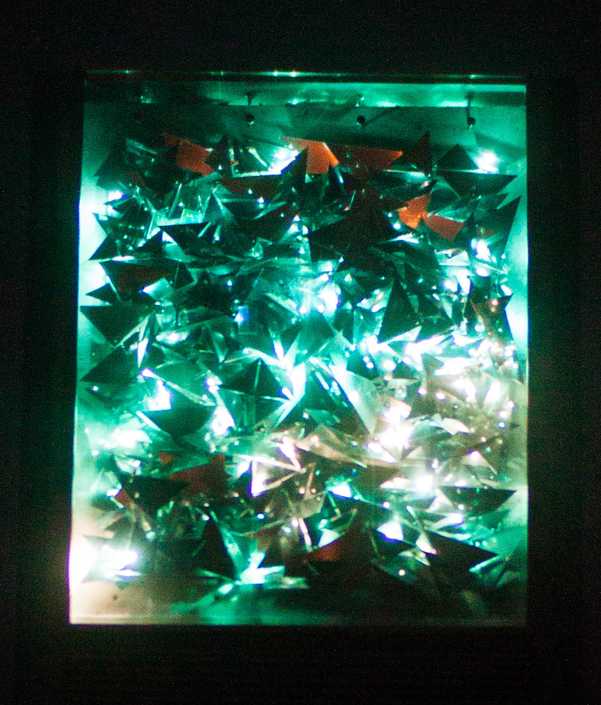 Global Seed Vault